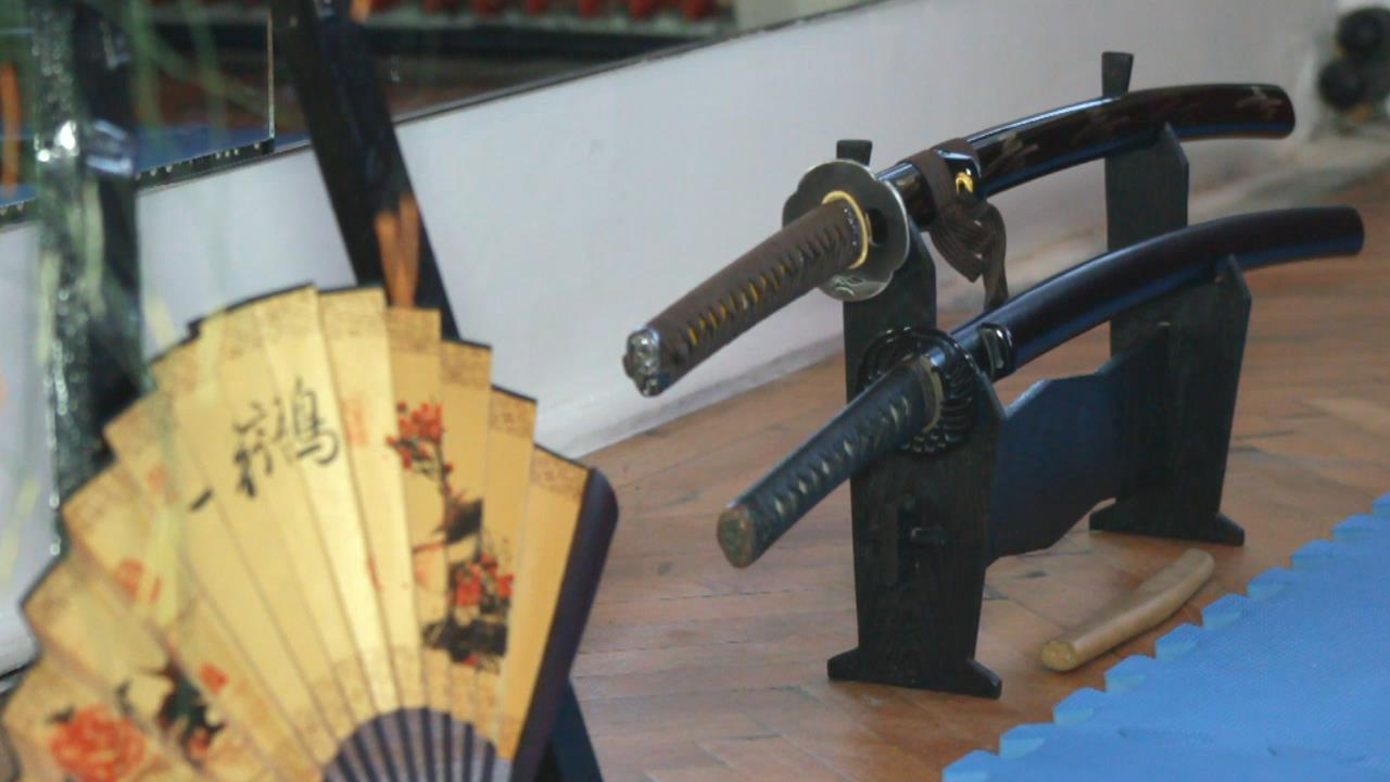 Shinken Kamiza...